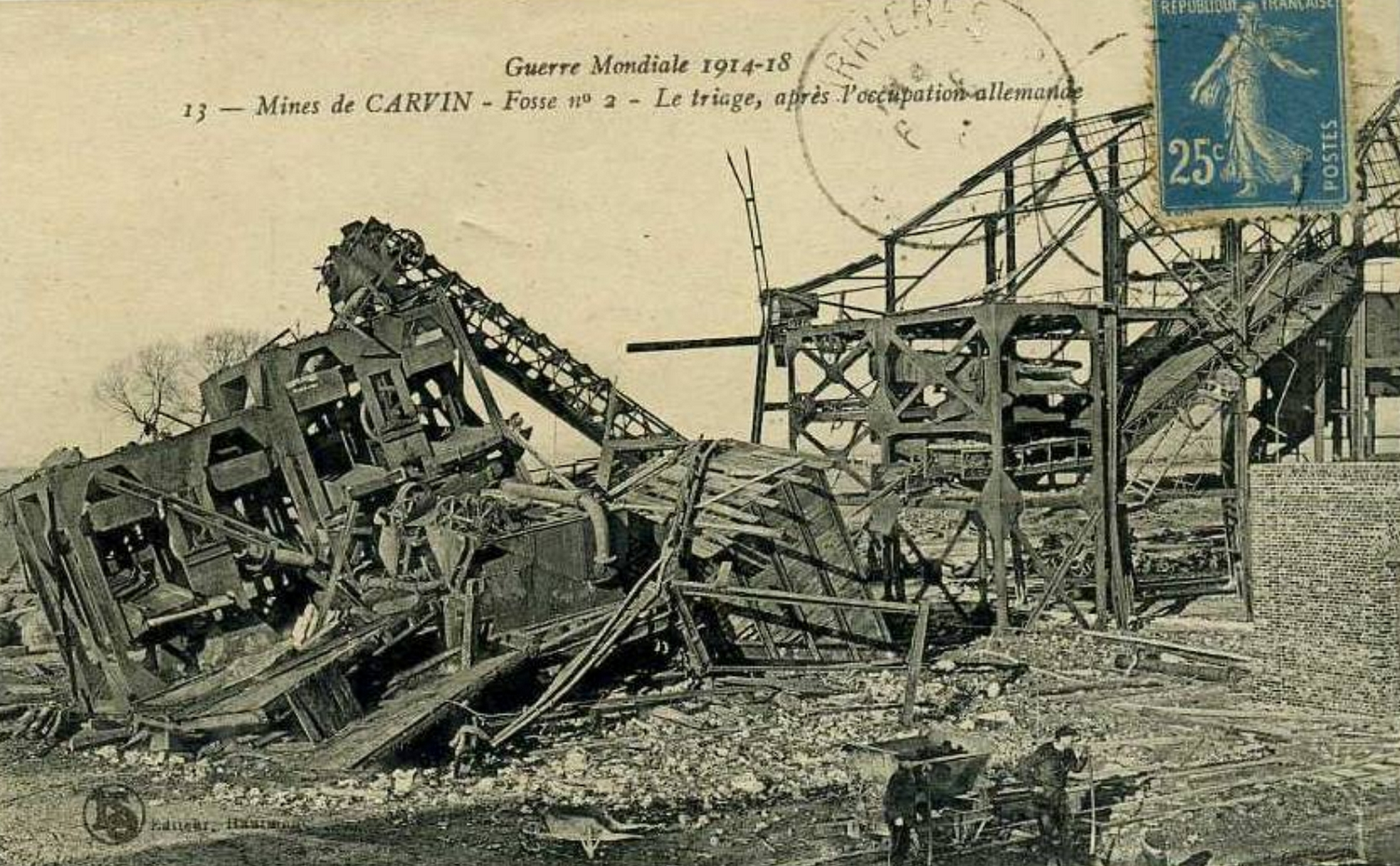 La fosse n° 2 de la Compagnie des mines de Carvin était un charbonnage constitué d'un seul puits situé à Carvin, Pas-de-Calais, Nord-Pas-de-Calais, France.